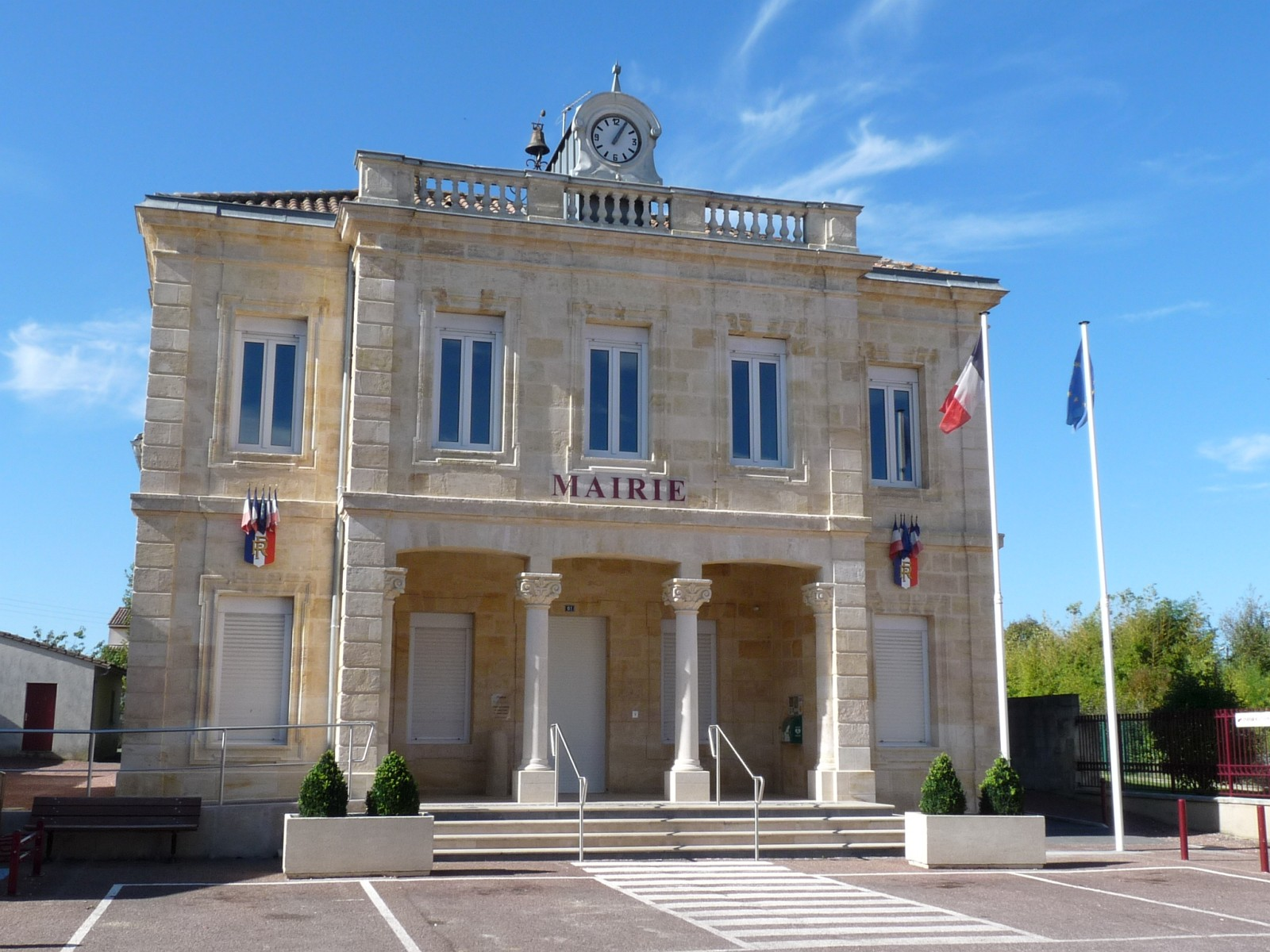 Mairie de Cavignac, Gironde, France